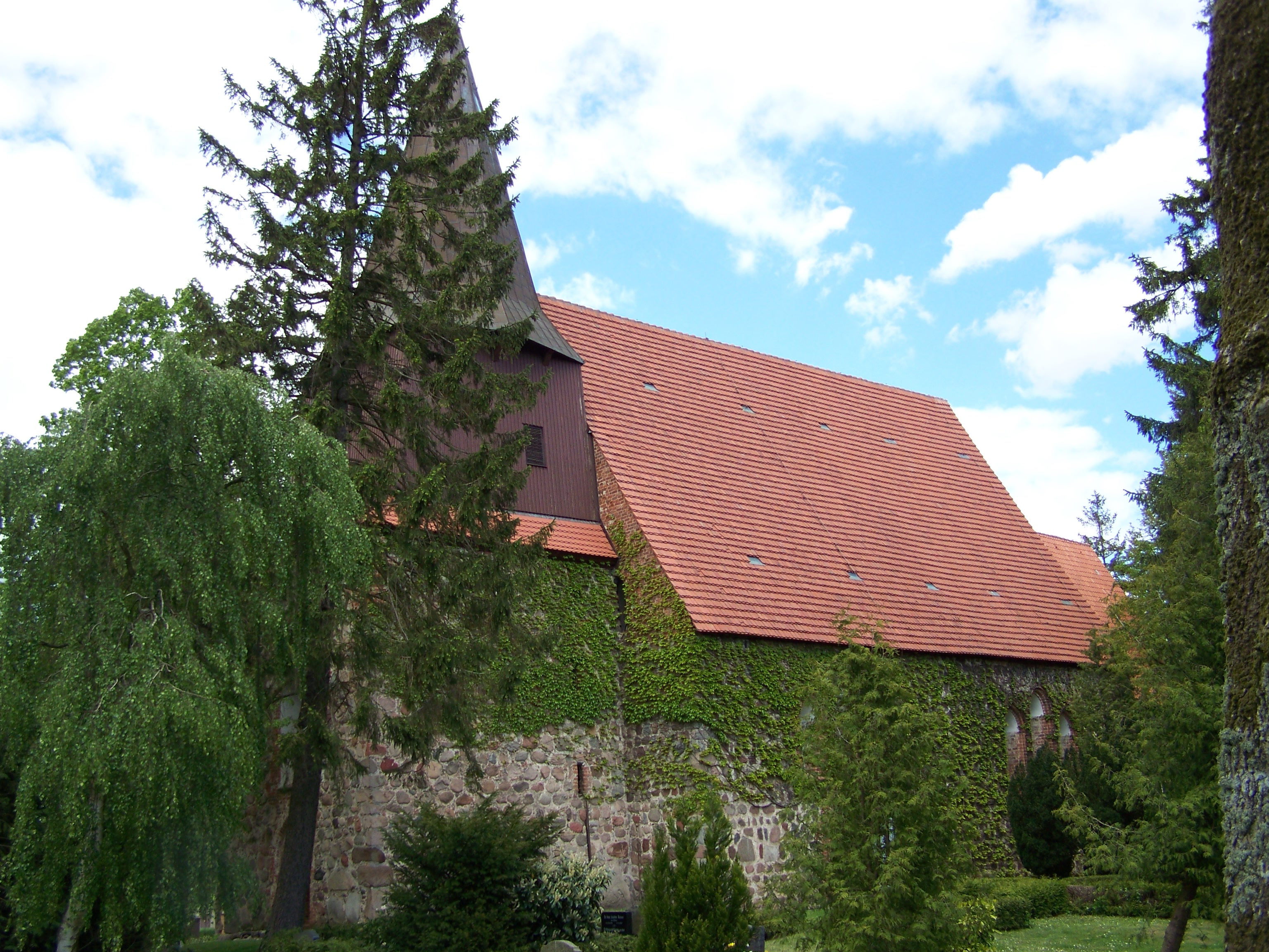 Kirche in Kirch Baggendorf, Vorpommern (2009-05-13)